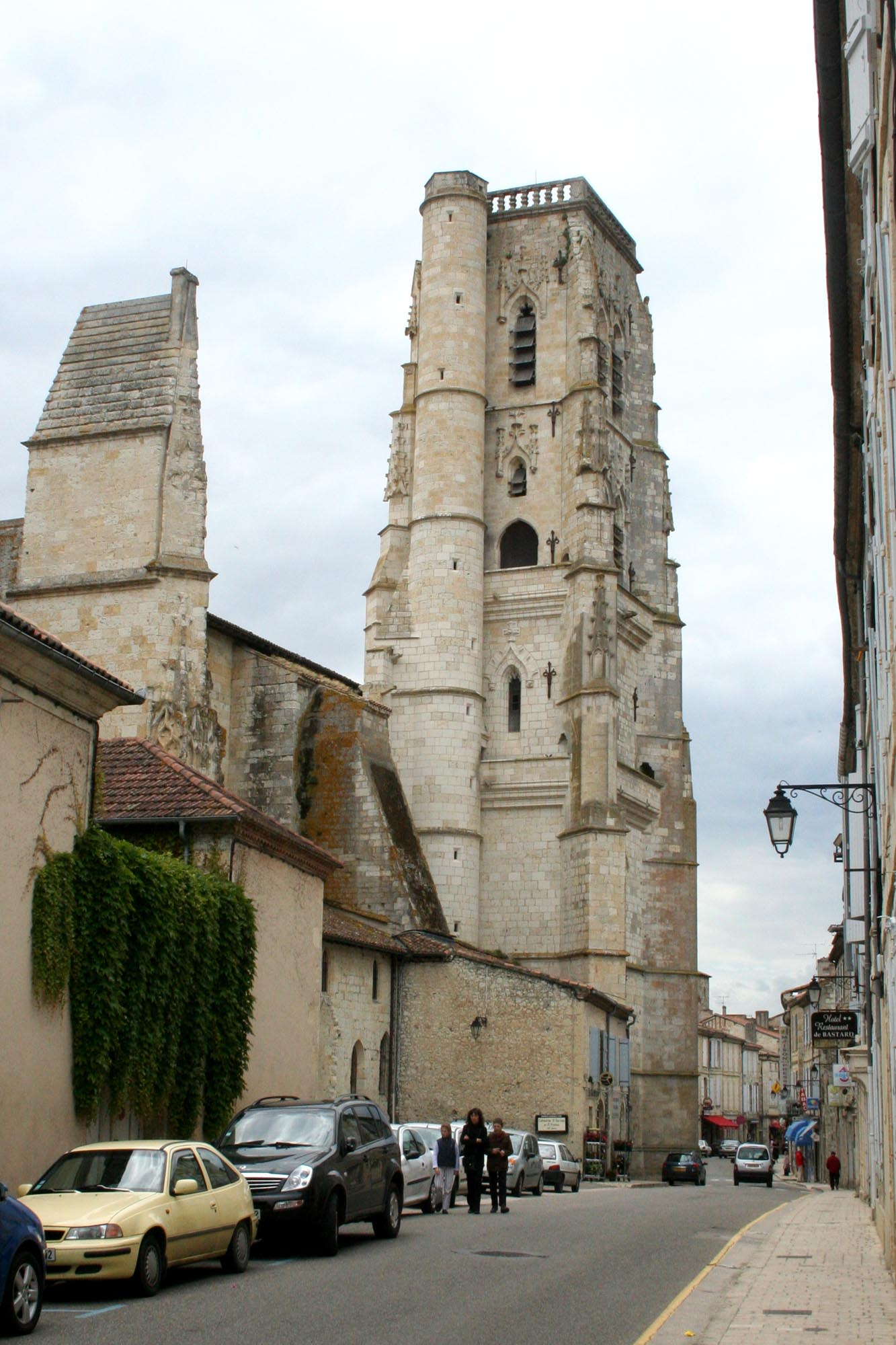 Clocher, vu de l'est, cathédrale Saint-Gervais-Saint-Protais de Lectoure (Gers, Midi-Pyrénées, France).